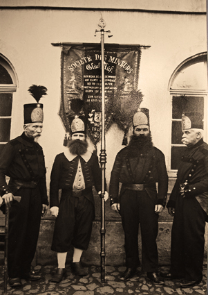 Antiguos mineros alsacianos - Old Alsacian Miners